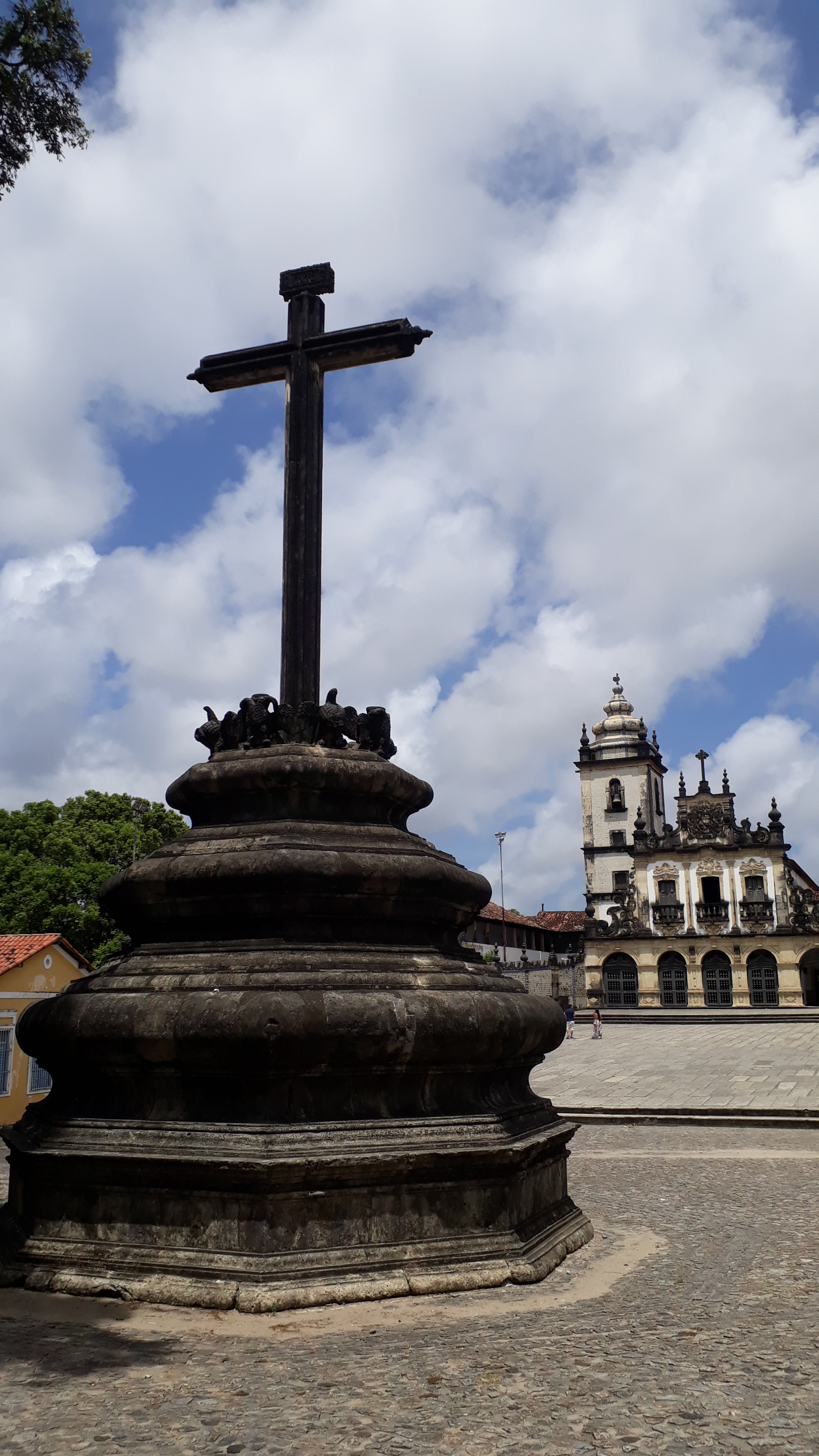 Cruzeiro do Centro Cultural São Francisco em João Pessoa, na Paraíba